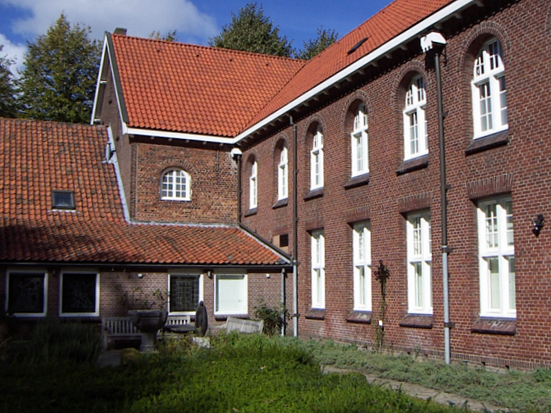 Met toestemming van de directie van het museum voor religieuze kunst Uden